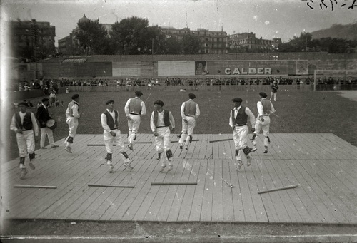 III. Euskal Astea, Donostia, 1929